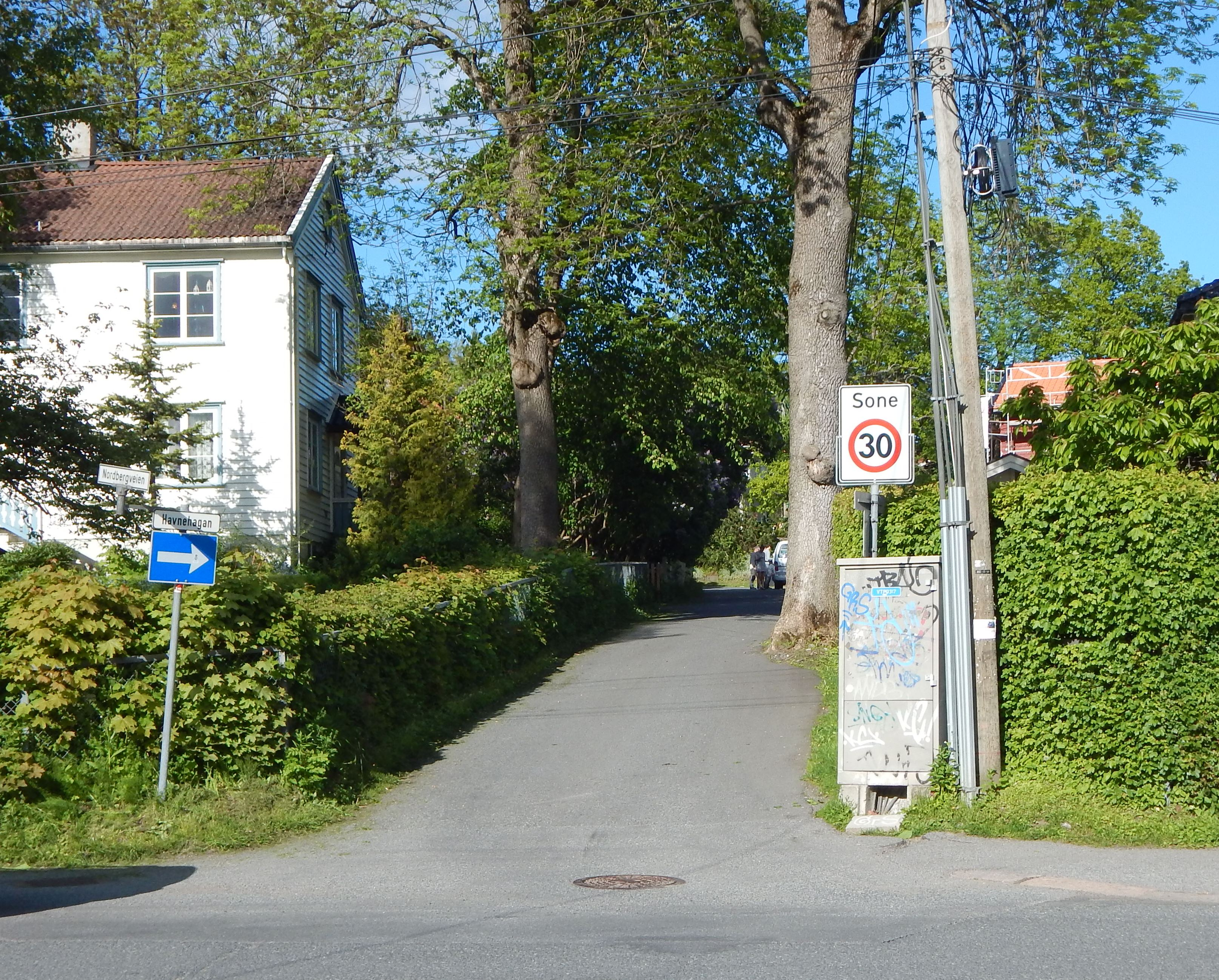 Havnehagan ved Nordbergveien